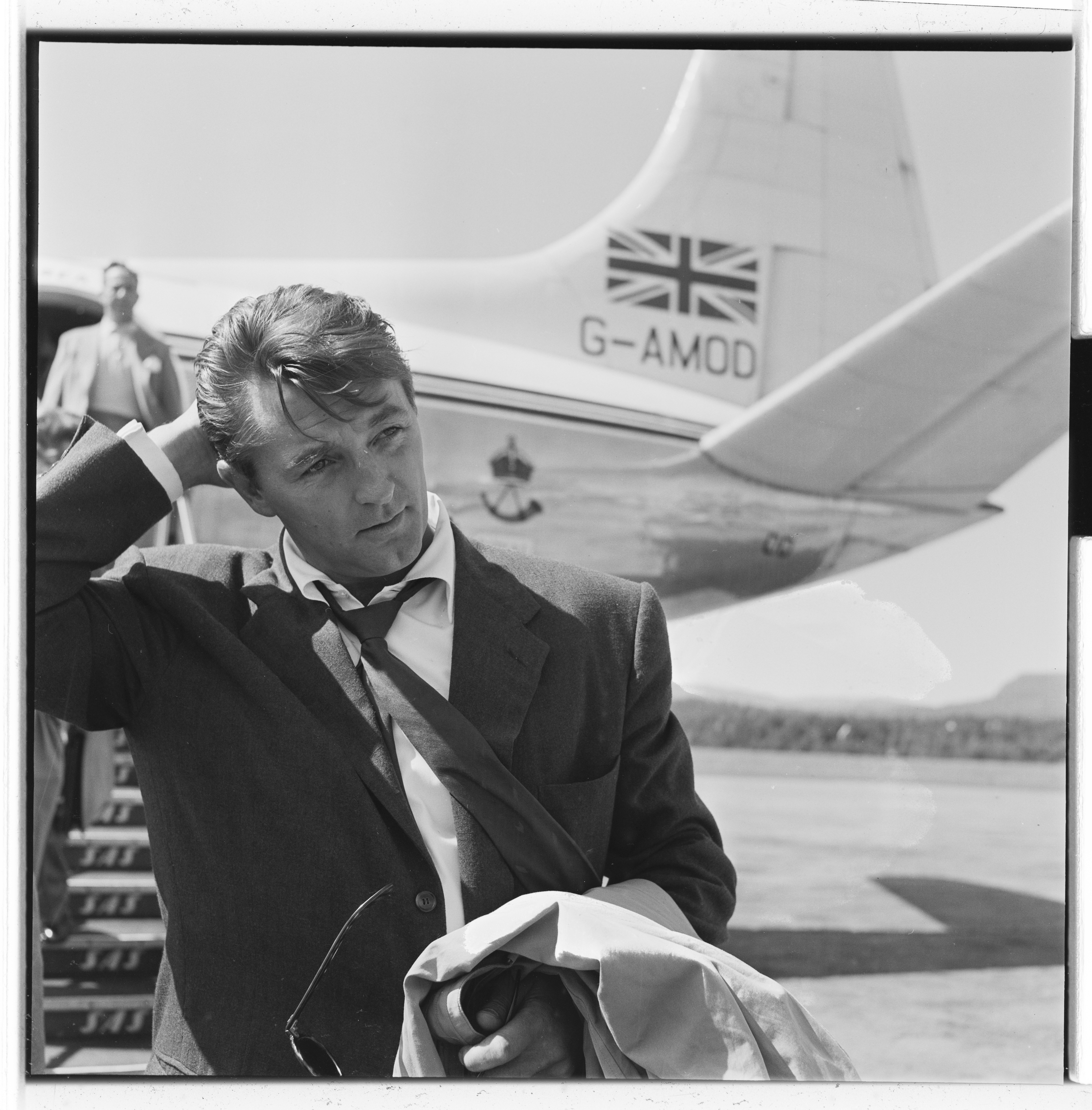 Bildet er hentet fra Arkivverket. Robert Mitchum på Fornebu Arkivinstitusjon : Riksarkivet Arkivnavn : Billedbladet NÅ Sted : Norge, Akershus, Bærum, Fornebu Emneord: Skuespillere, fly, menn, kvinner Avbildet: Mitchum, Robert